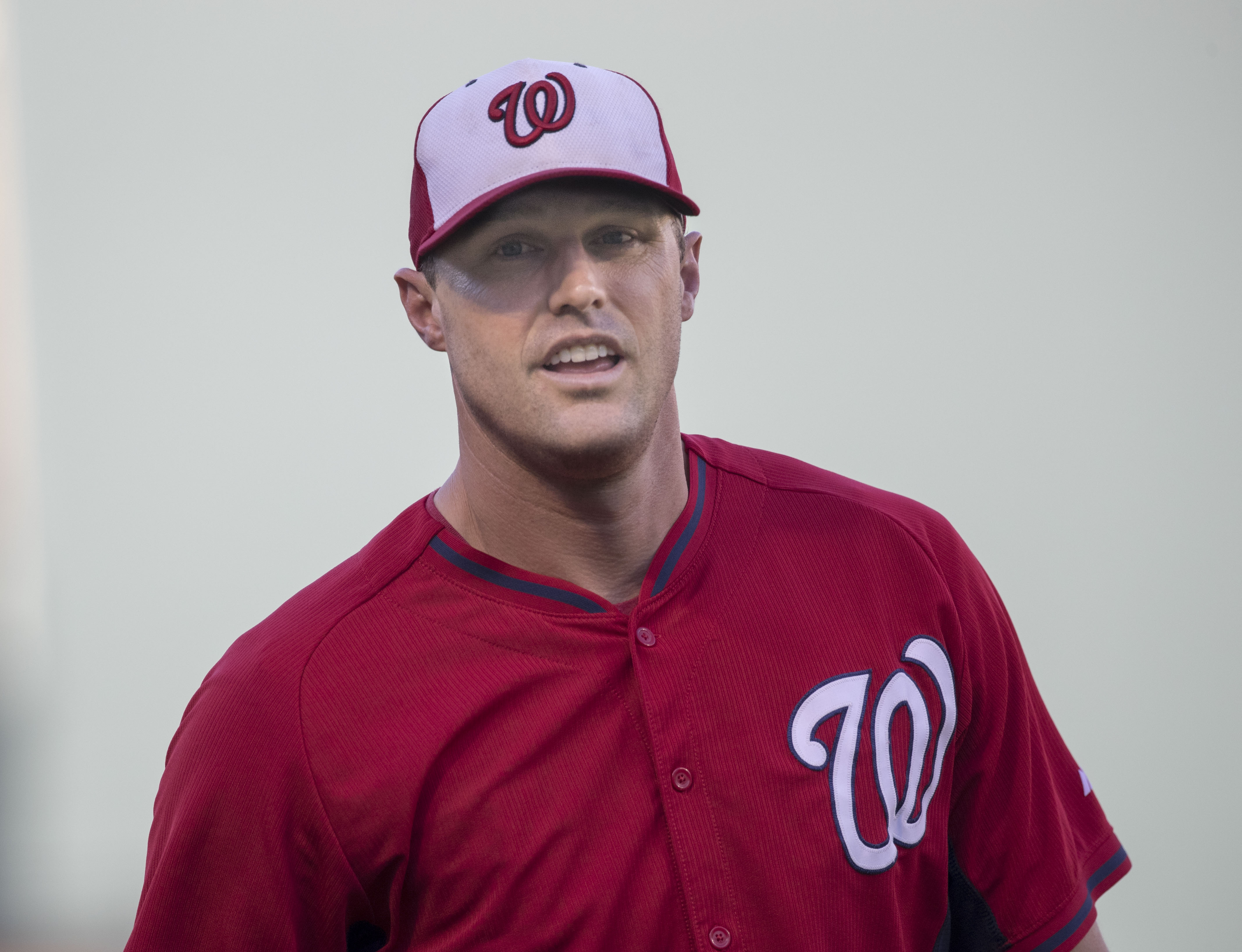 Matt Belisle